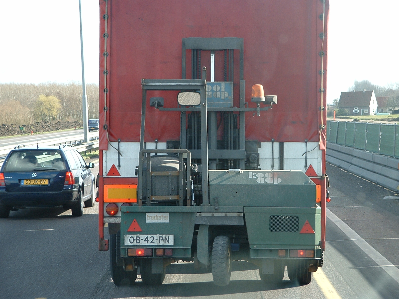 kooiaap